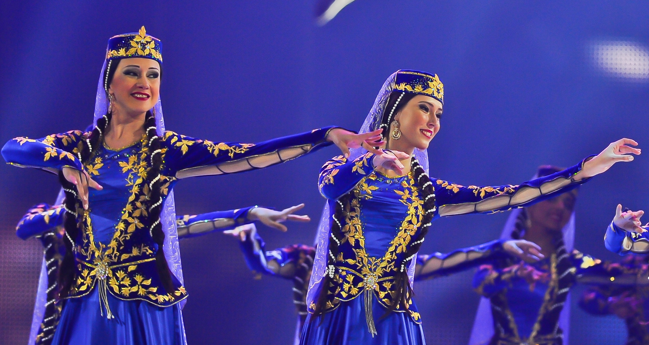 Танцовщицы на сцене Baku Crystal Hall